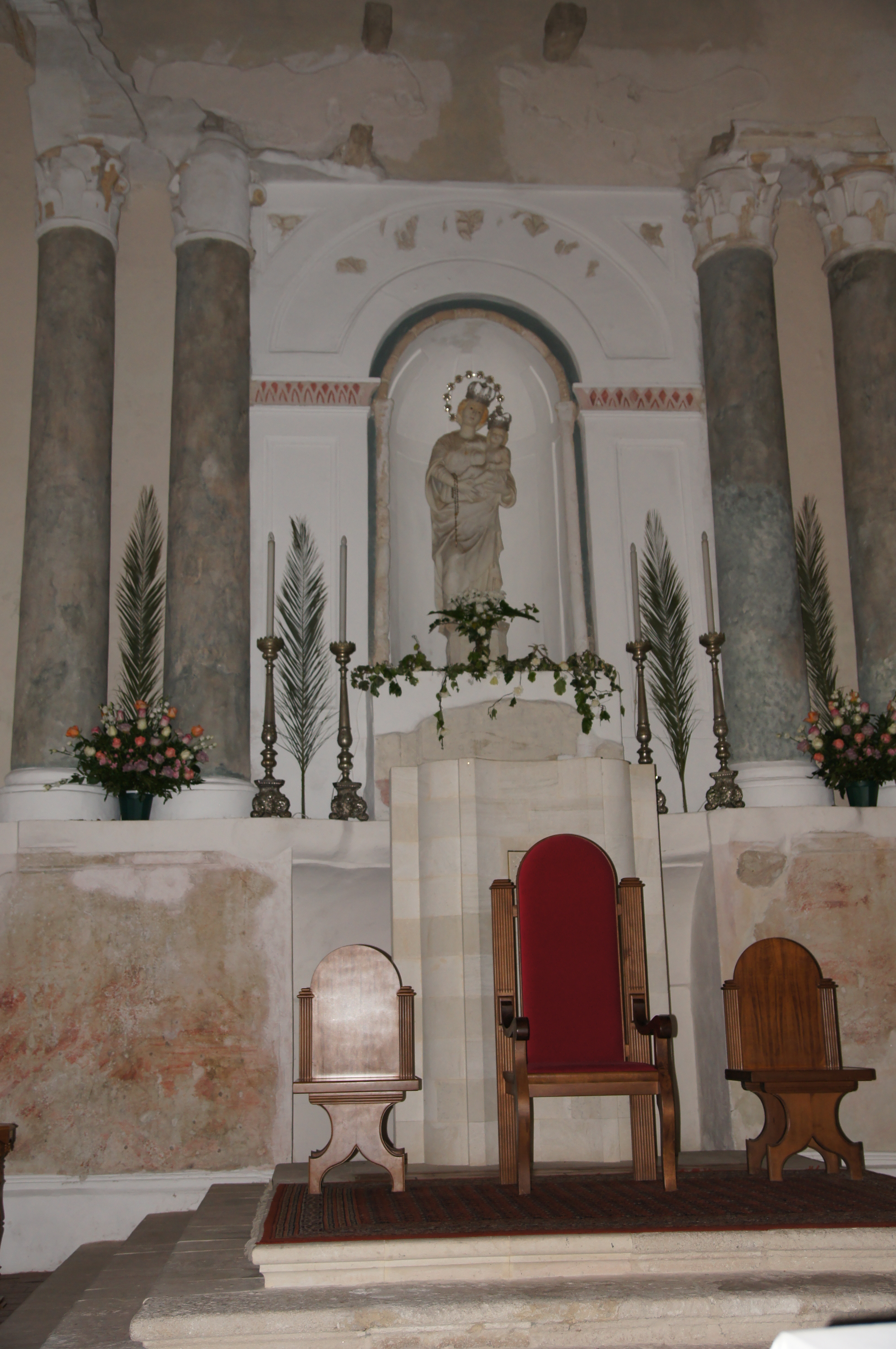 Caltabellotta